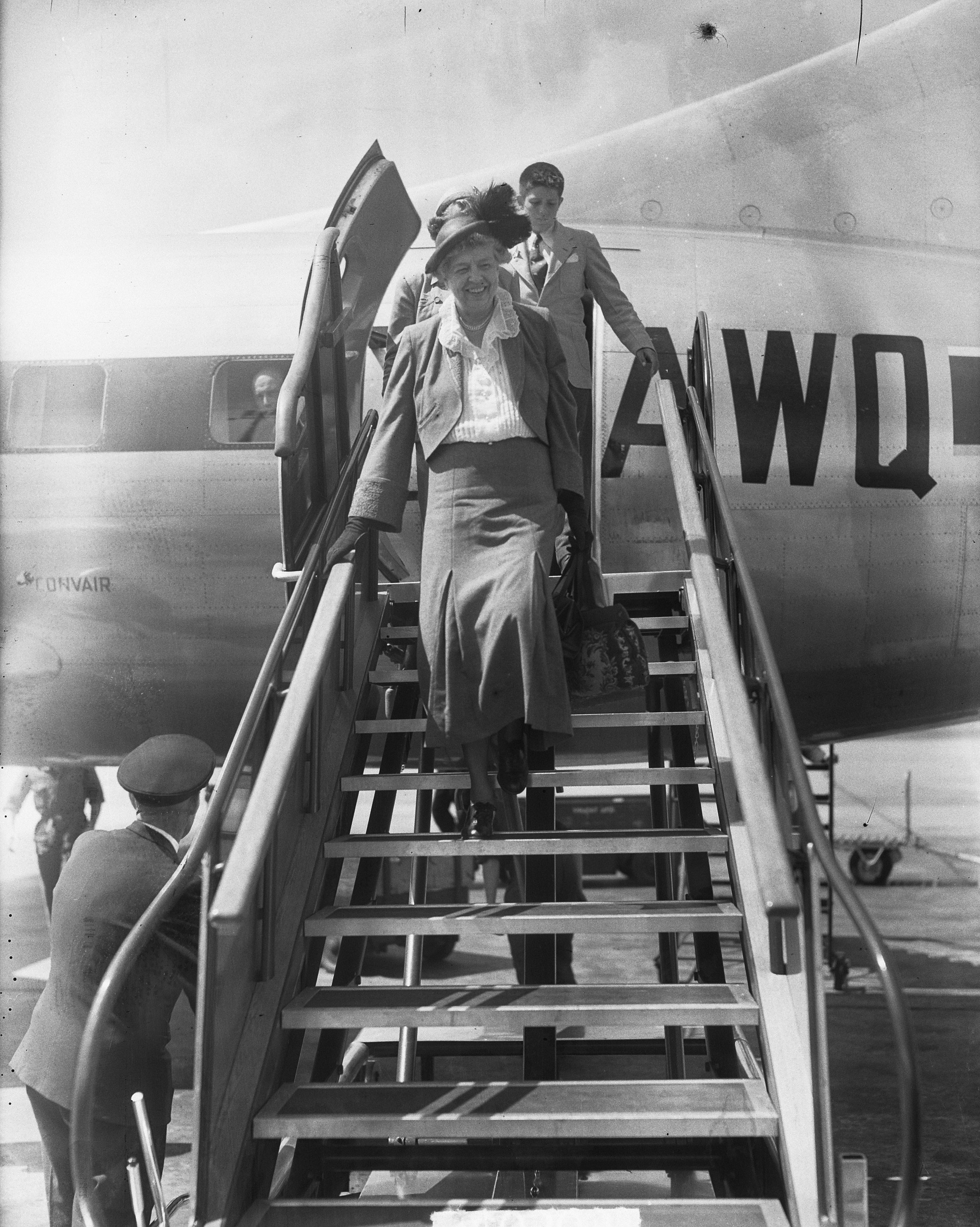 Collectie / Archief : Fotocollectie Anefo Reportage / Serie : [ onbekend ] Beschrijving : Op vliegtuigtrap Datum : 19 juni 1950 Trefwoorden : vliegtuigtrappen Fotograaf : Noske, J.D. / Anefo Auteursrechthebbende : Nationaal Archief Materiaalsoort : Glasnegatief Nummer archiefinventaris : bekijk toegang 2.24.01.09 Bestanddeelnummer : 904-0303